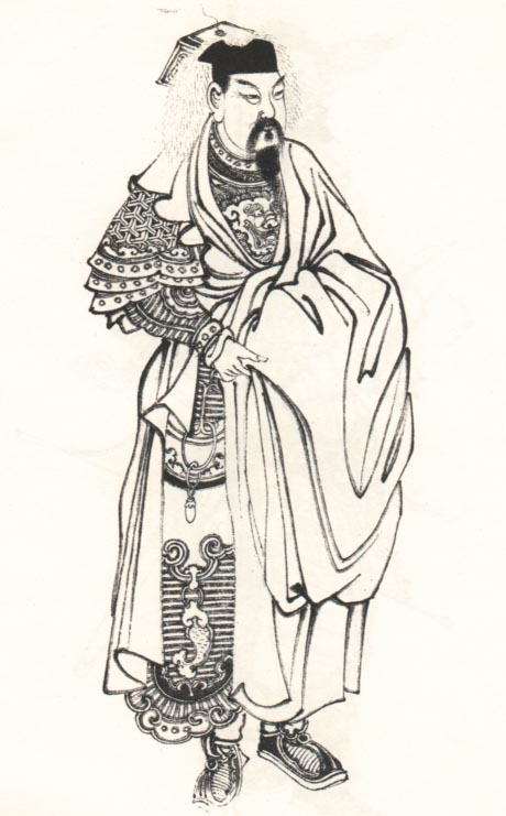 傅有德，明朝军事将领。